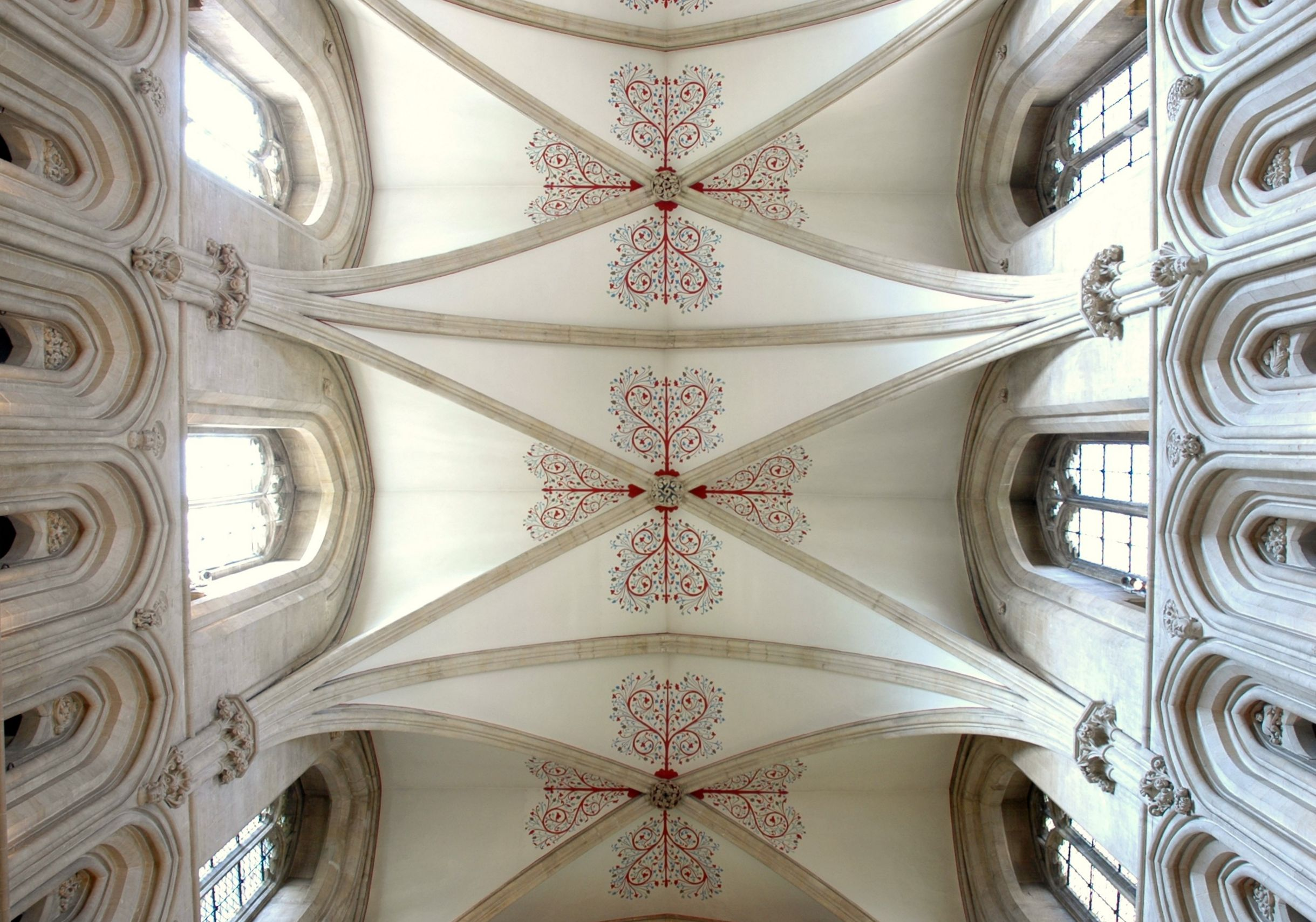 Catedral de Wells - Volta nau